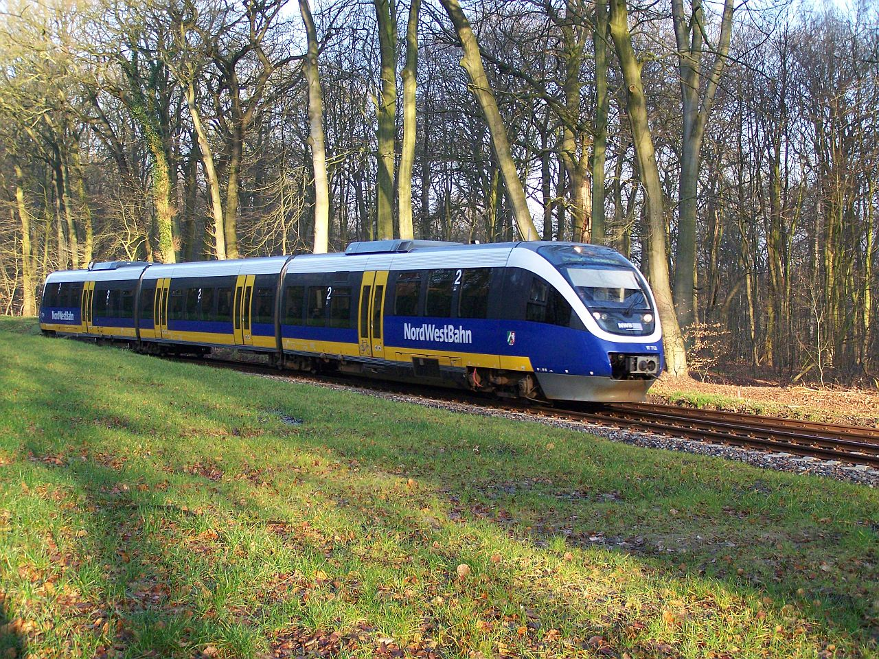 Bombardier Talent VT 716 der FVE bei der Einfahrt in die Haltestelle "Klinikum Bremen-Nord"